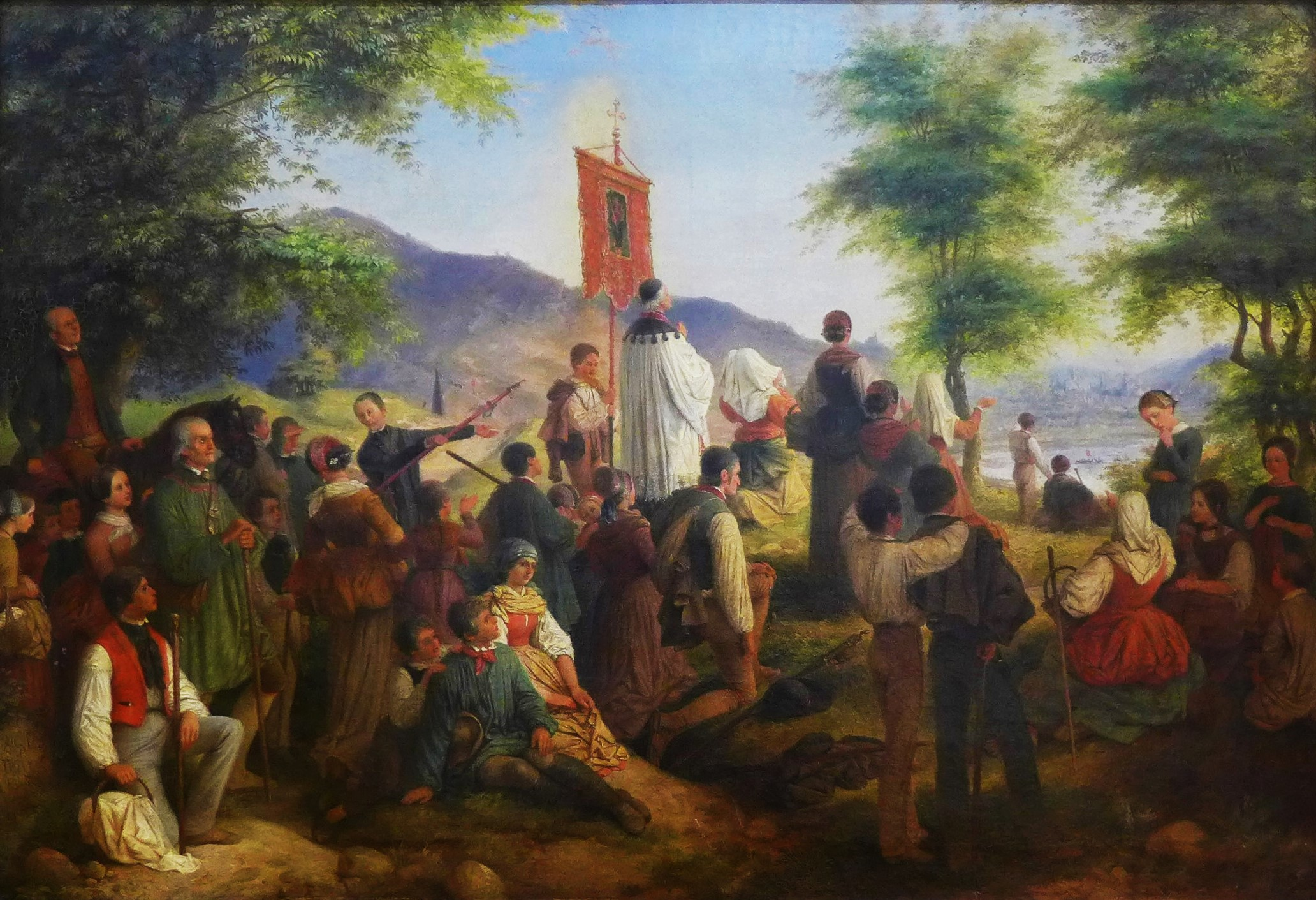 Wallfahrt zum Heiligen Rock im Jahr 1844, Gemälde von Augustin Gustav Lasinsky, 1847, Stadtgeschichtliches Museum Trier im Simeonstift, Inventarnummer III, 67